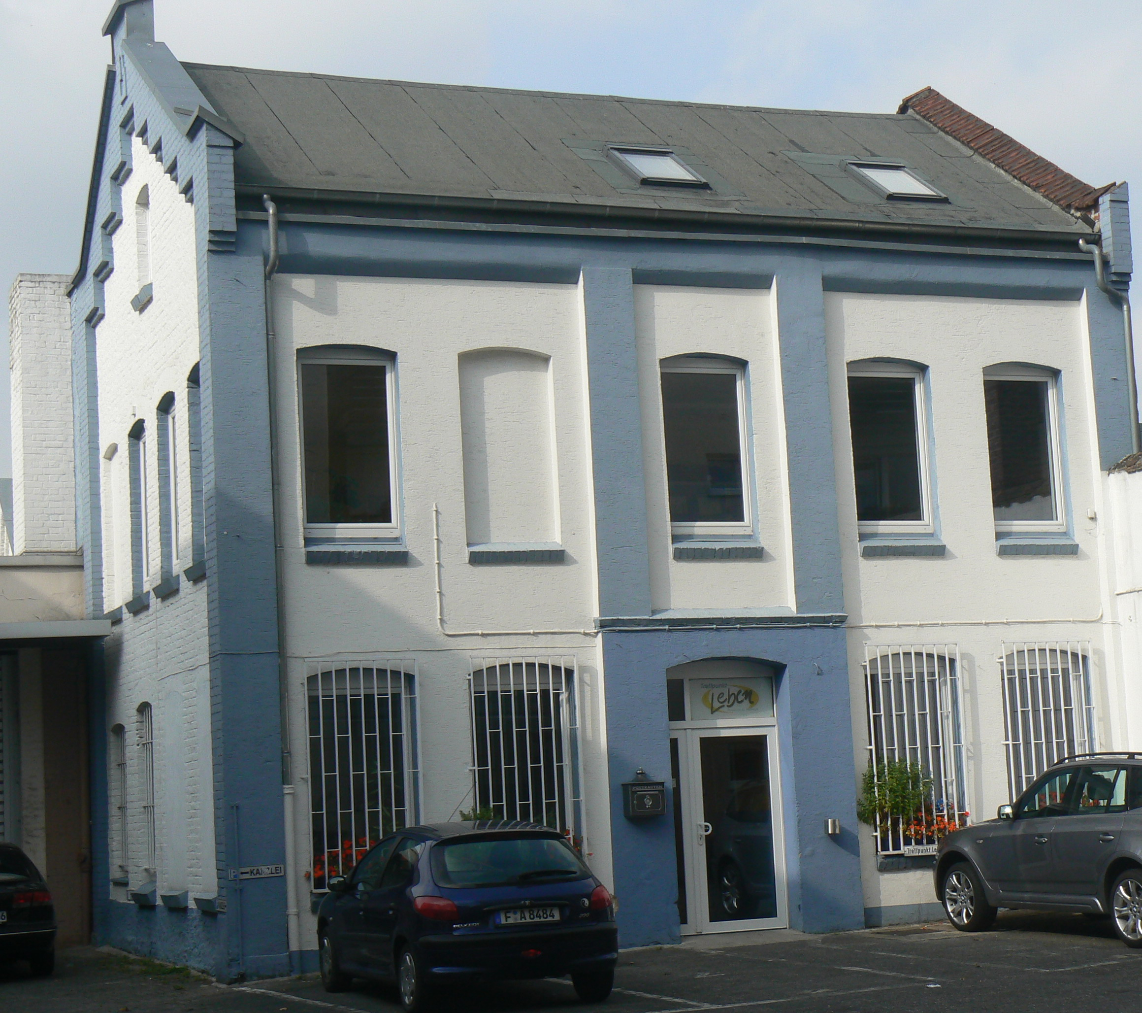 Ehemaliger Nutzer: Kirche Leben (freikirchliche Gemeinde), 2011 abgerissen, überbebaut mit neuem Mehrfamilienwohnhaus. Dieses niedergelegte Gebäude und die ebenfalls dahinter gelegenen alten Fabrikhallen standen auf einem bereits 1778 durch Elsässer aus Schlettstadt, heute Sélestat, gegründeten Tochterunternehmen. Nach der Annexion 1871 übernahmen Heinrich Ratazzi und Heinrich May das Unternehmen. Unter dem Namen Rosswag's Nachfolger Ratazzi & May arbeiteten hier im früheren Mittelweg 14, heute Kurfürstenstraße 14, bis zu 40 Arbeiter. Sie produzierten vorwiegend Drahtflechtmatten aus Messing- und Eisendraht, u.a. für die Papierindustrie. Während des 2. Weltkriegs wurde die Produktionsstätte nach Schlüchtern verlegt. Die ehemaligen Lehrlinge Paul und Ruppel errichteten dort das heute noch bestehende weltweite Unternehmen PACO, das immer noch erfolgreich Metallmatten und Filter herstellt. Das Verwaltungsgebäude mit Treppengiebel aus der Gründerzeit verfiel, wurde dann aber nochmals saniert. In die ehemaligen Fabrikationsräume zog ein Bürofachhandel ein. Der Eigentümer ließ nunmehr ein Mehrfamilienhaus mit Tiefgaragen errichten.